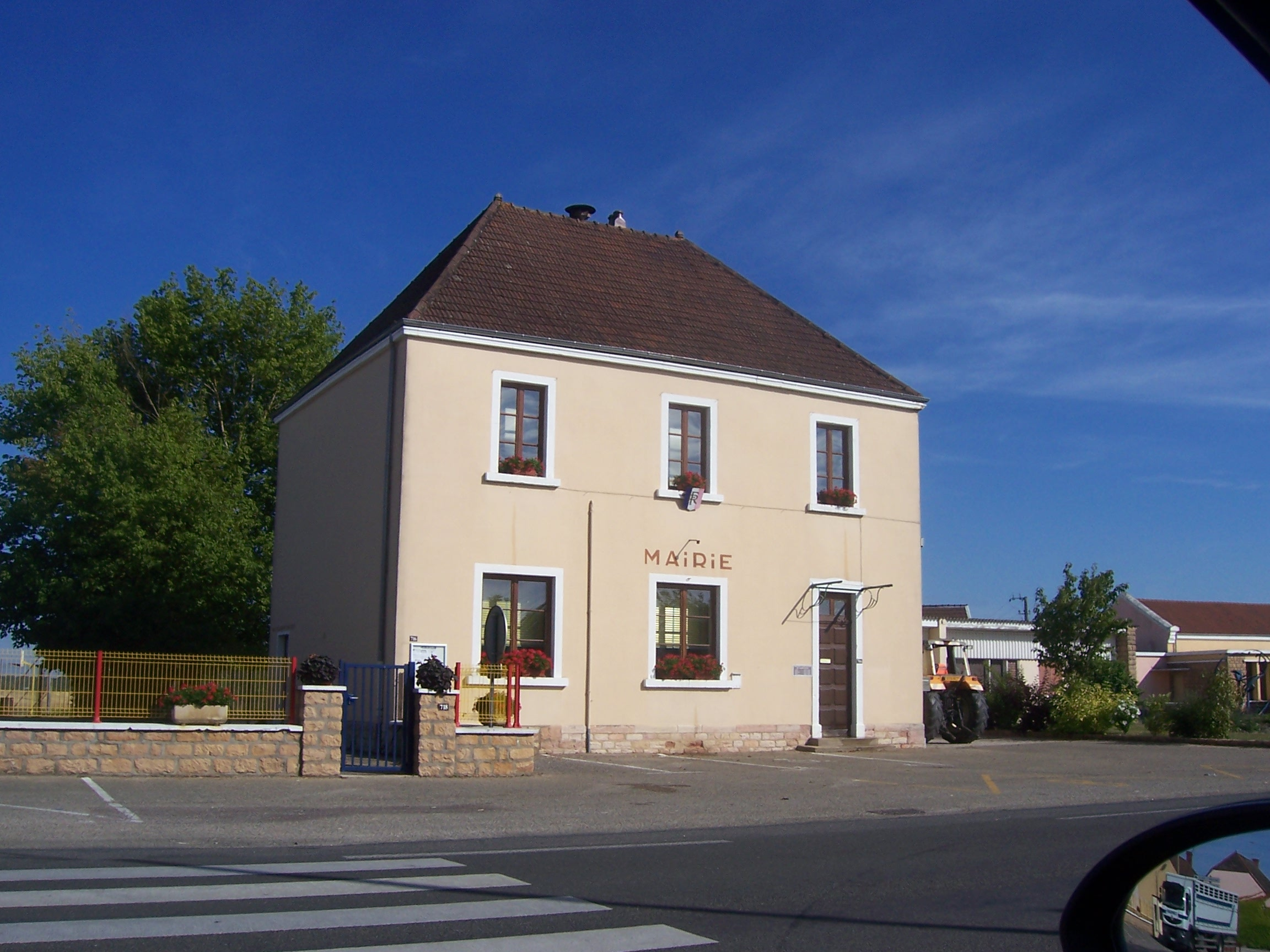 Mairie de Rancy